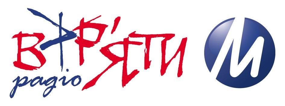 Вар'яти. Лого, Версія 1